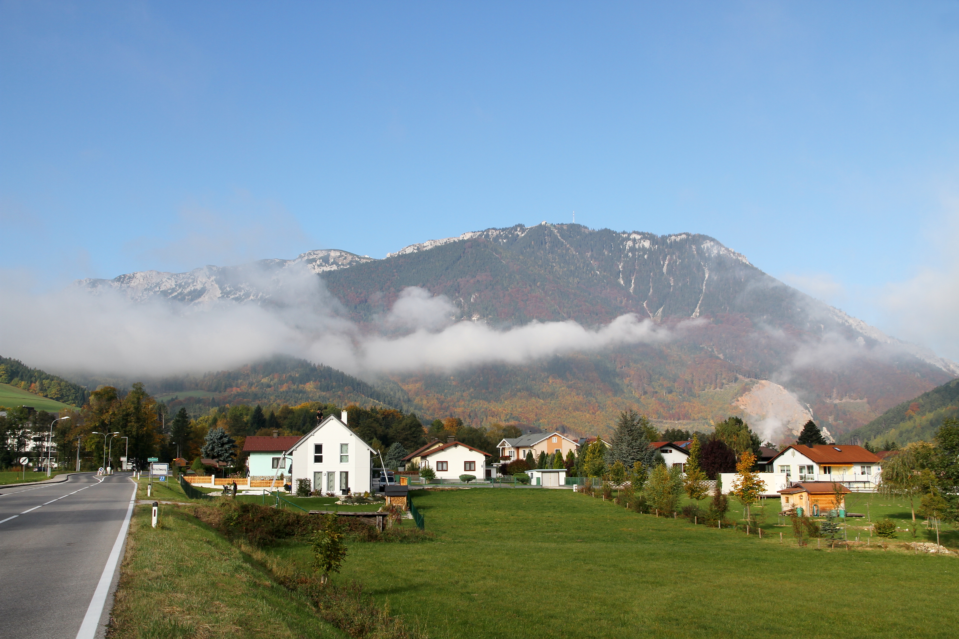 Südostansicht der Rax. Im Vordergrund Hirschwang, etwas rechts der Bildmitte die Bergstation der Raxseilbahn und von der wiederum rechts der Rax-Sender.